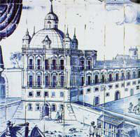 Azulejos seiscentistas representando o torreão do extinto Paço da Ribeira, Lisboa, Portugal.